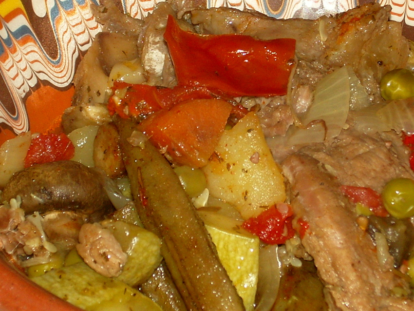 Овчарски гювеч с говядиной